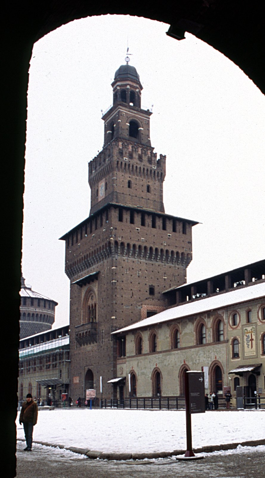 Castello Sforzesco di Milano. La Torre del Filarete vista dalla Corte principale, all'interno del castello.